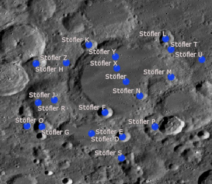 Cráter lunar Stöfler. Cráteres satélite. (Imagen LRO)